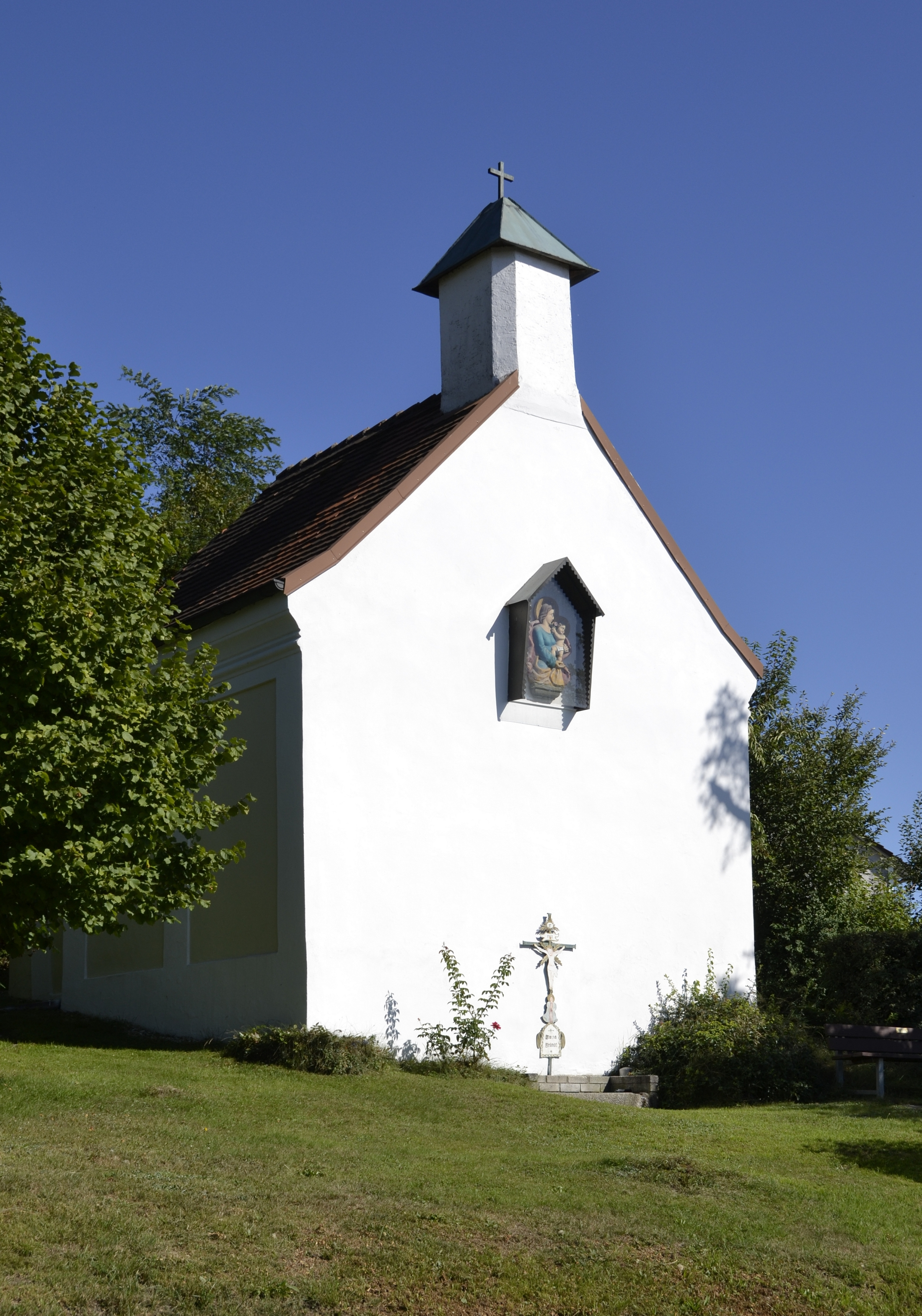 Die Katholische Wallfahrtskapelle (Bründlkapelle) in Alkofen, Vilshofen an der Donau.